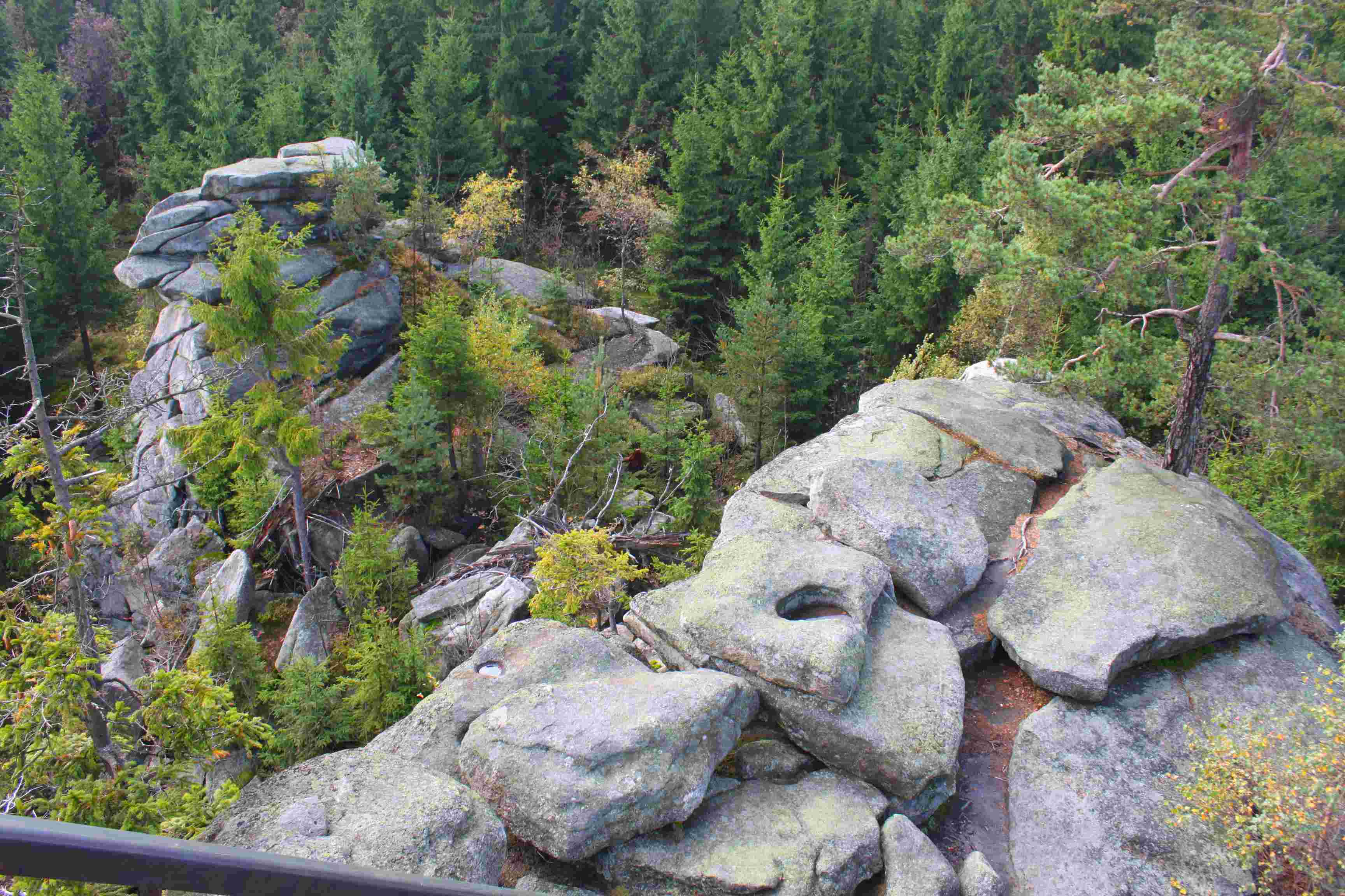 Blick vom Burgsteinfelsen auf der Luisenburg